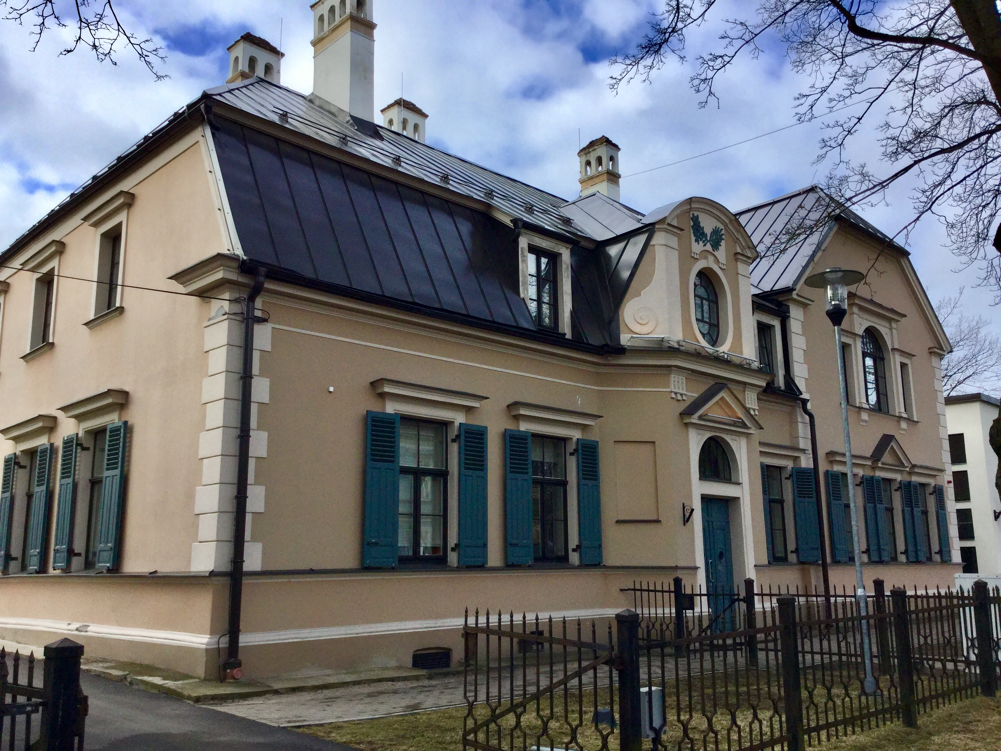 Dzīvojamā ēka, tagad skola, Rīga, Baložu iela 27